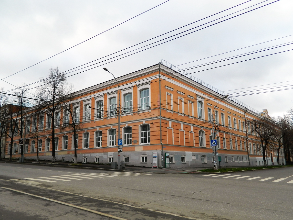 Пермская мужская гимназия